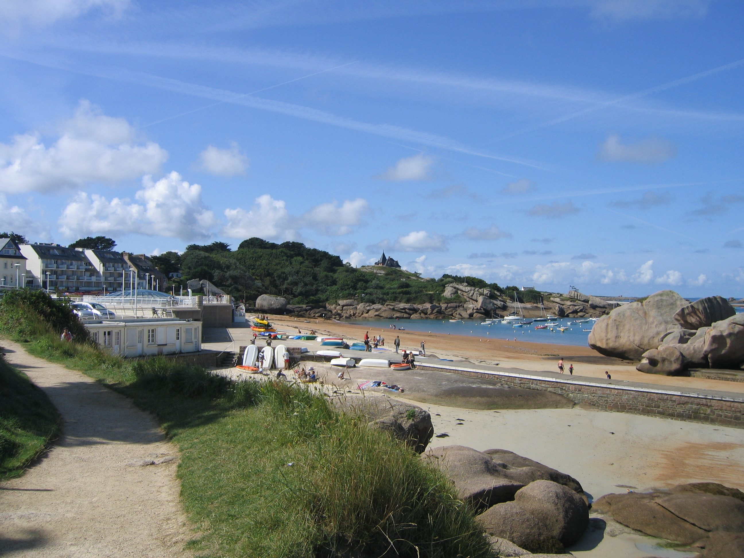 La côte de granit rose sur la commune de Trégastel dans les Côtes d'Armor